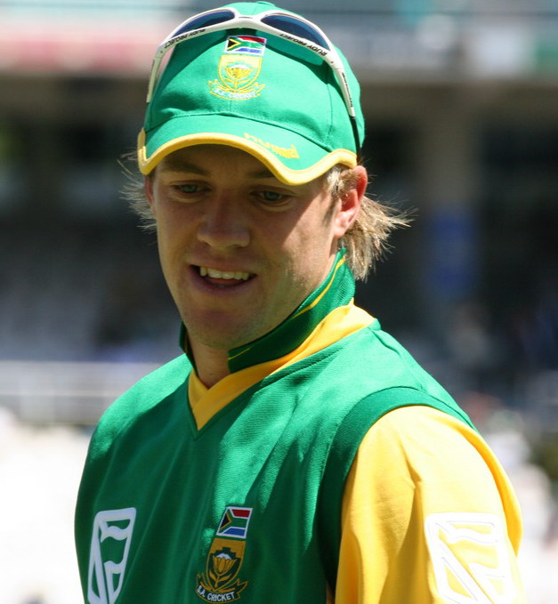 AB De Villiers